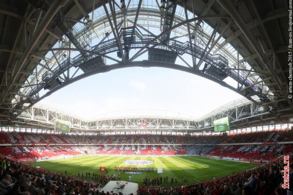 Перформанс из модулей на три трибуны на матче с "Зенитом"